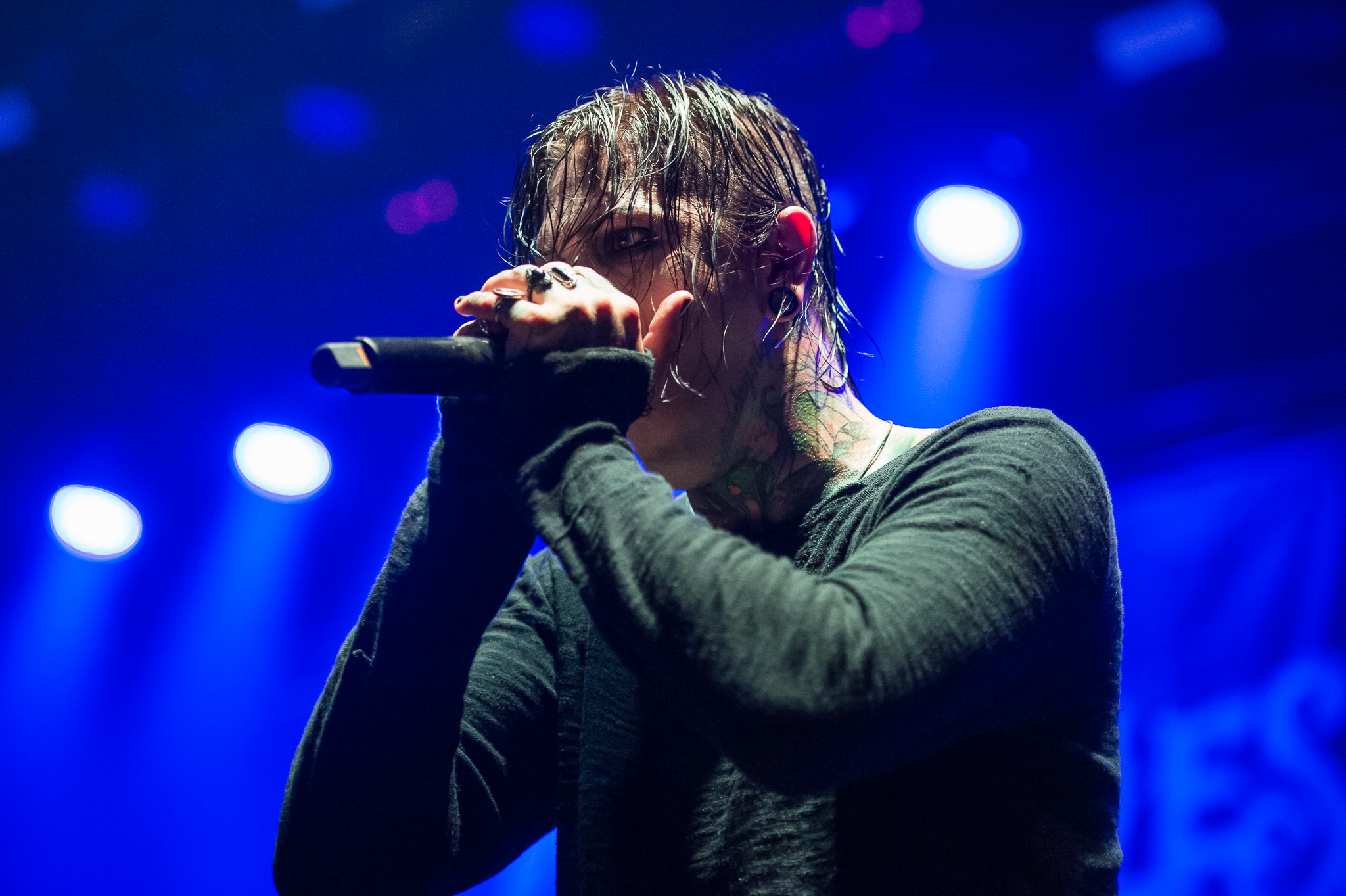 ARGO-Konzerte,Chris „Motionless“ Cerulli,Engelbert Strauss Alternarena,Konzert,Livekonzert,Livemusik,Motionless in White,Musik,RiP,Rock im Park 2017